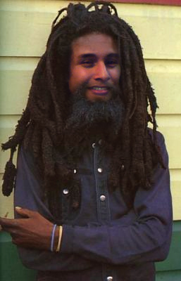 Rastafara / Breña(Lima-Perú)